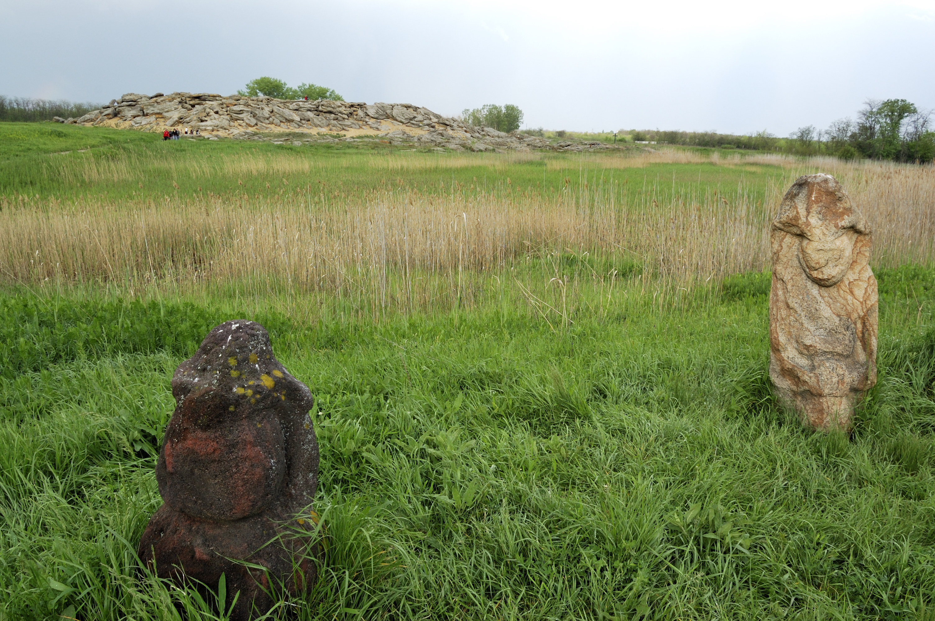 Культовий комплекс "Кам'яна Могила"